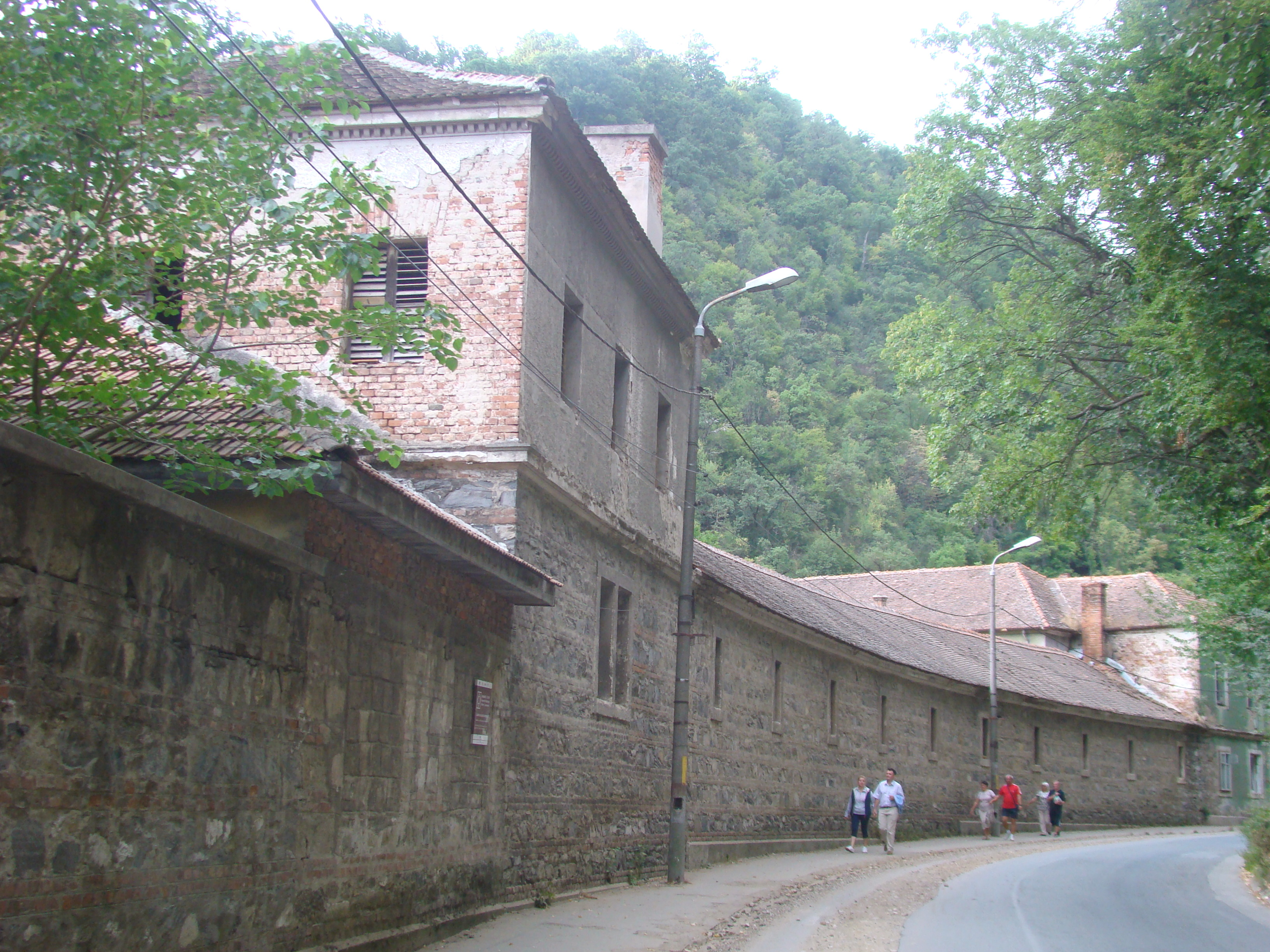 Locuințe grănicerești, cu anexe, azi locuințe, cu anexe, remiză pompieri, oraș Băile Herculane, Str. Castanilor 33